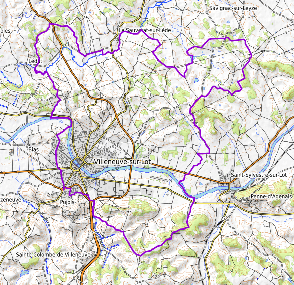 carte réalisée sur umap This map may be incomplete, and may contain errors. Don't rely solely on it for navigation.